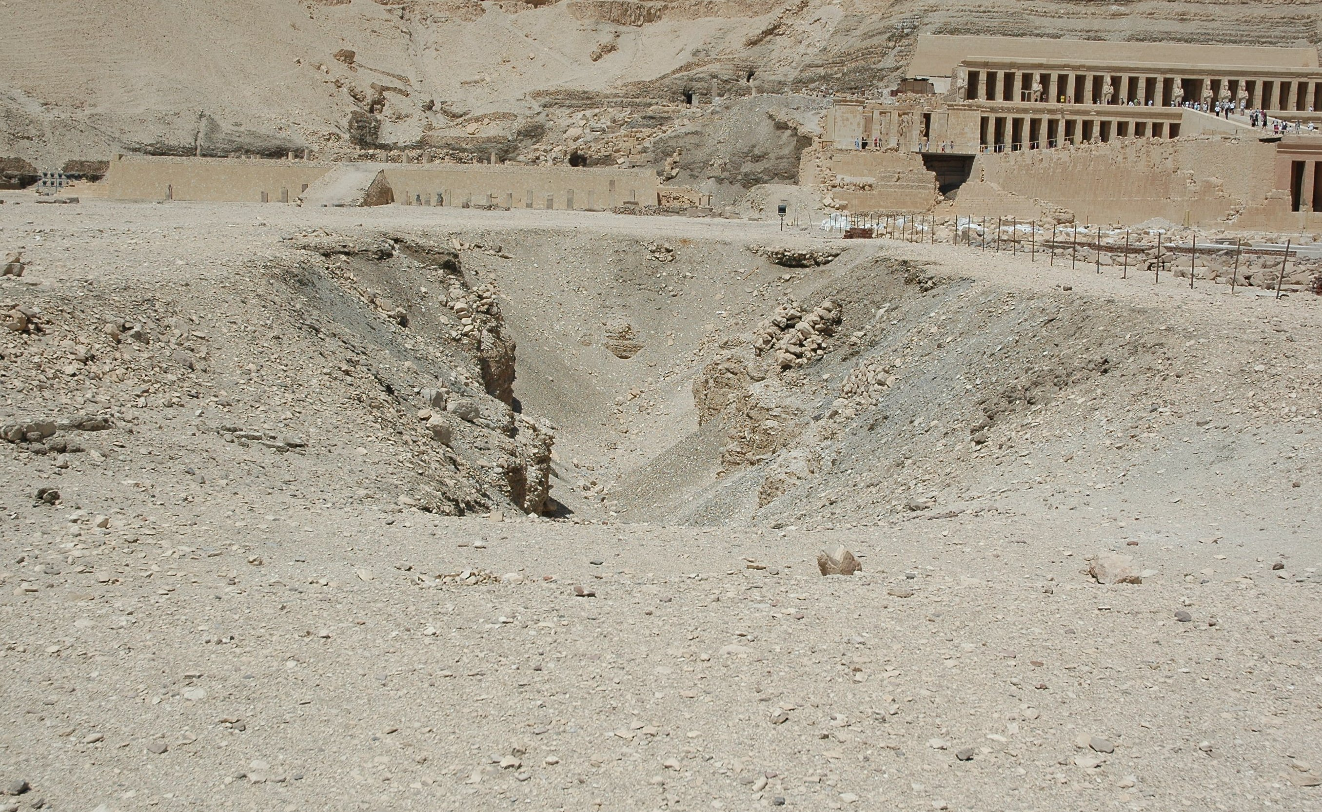 Zugang zum Bab el-Hosan, Anlge des Totentempel des Mentuhotep II., Deir el-Bahari